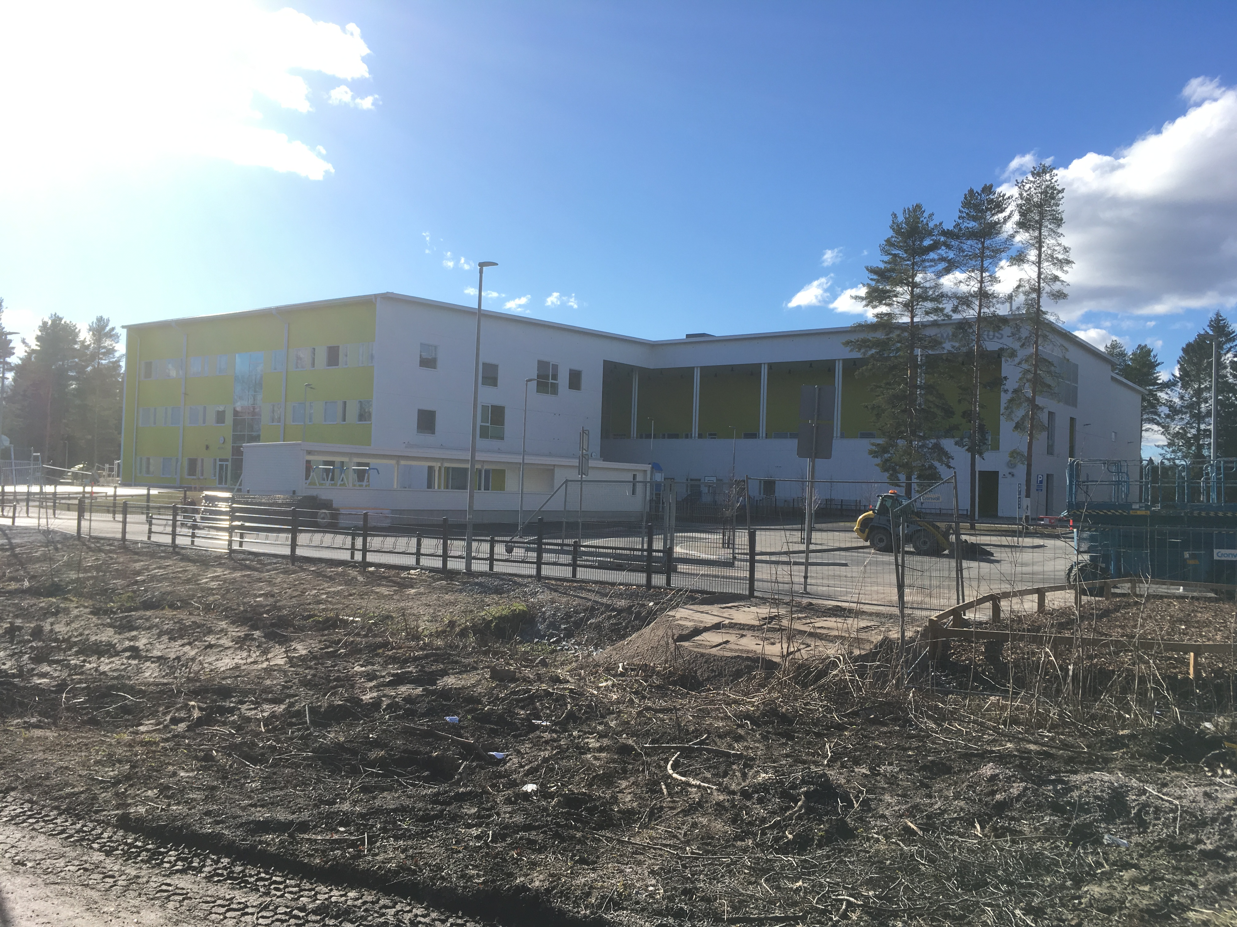 Nummikeskus huhtikuussa 2018